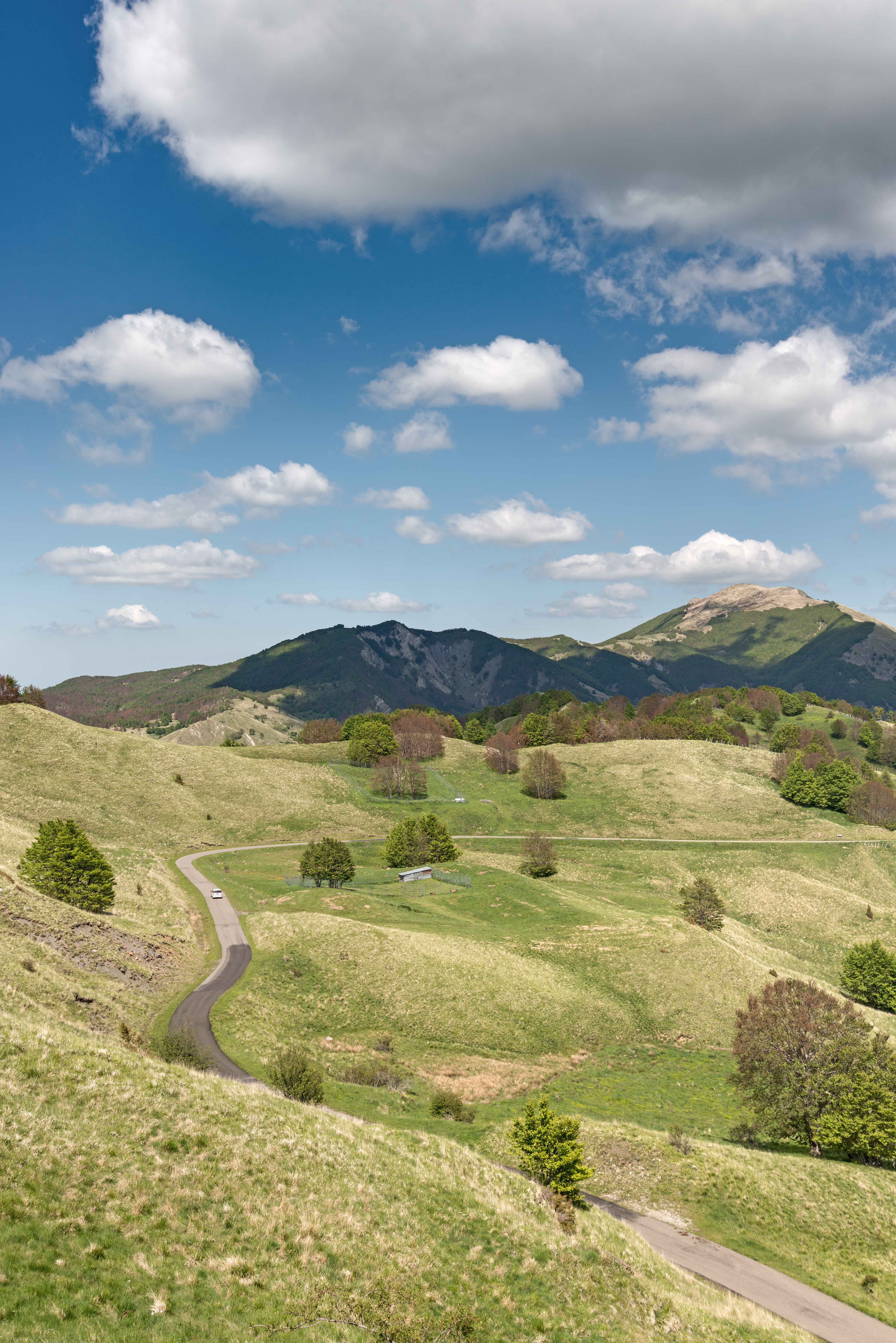 Scalucchia - Ramiseto, Reggio Emilia, Italia